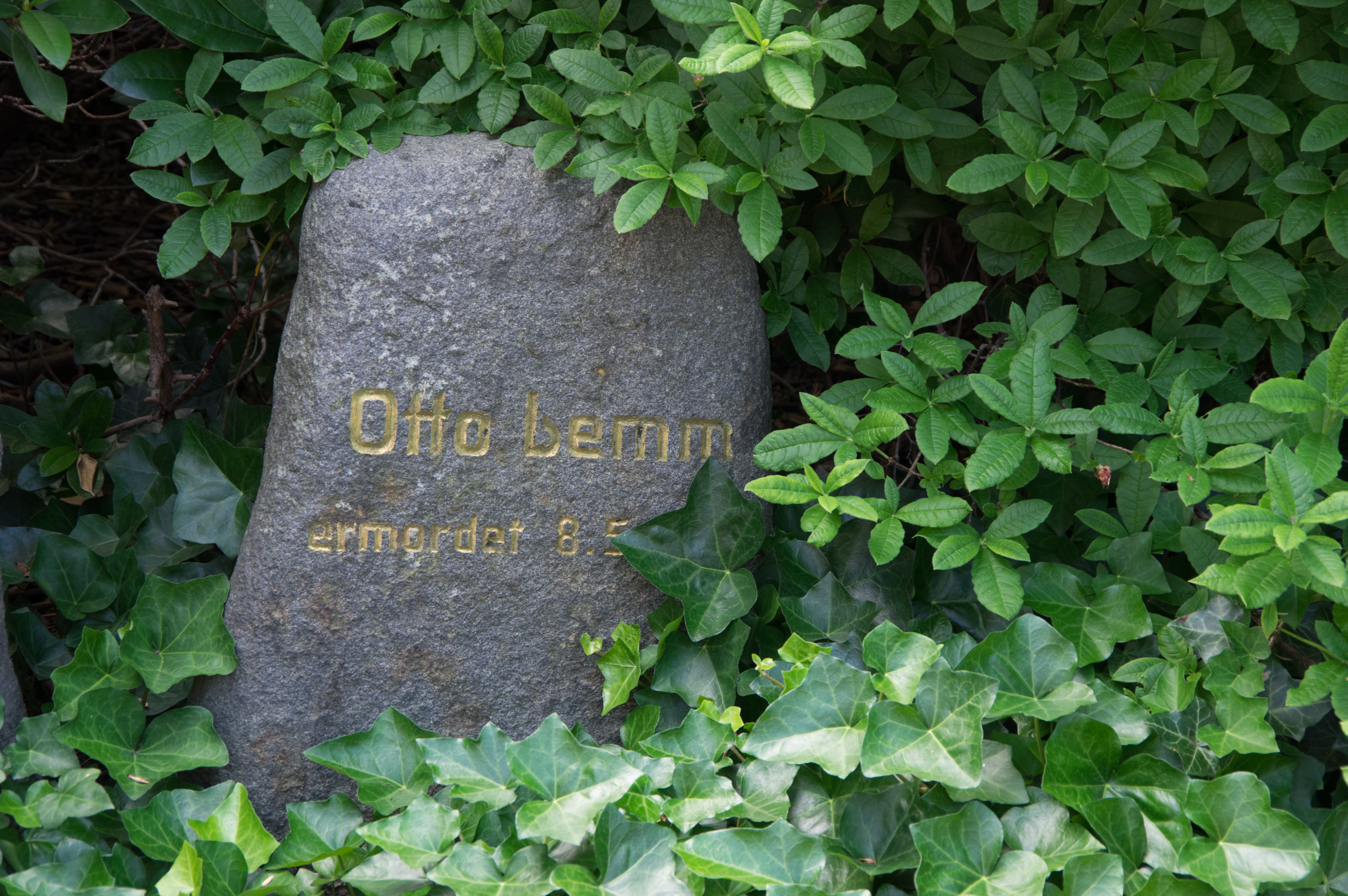 Wildau in Brandenburg. Die Gedenkdenkstein erinnern an Antifaschisten.